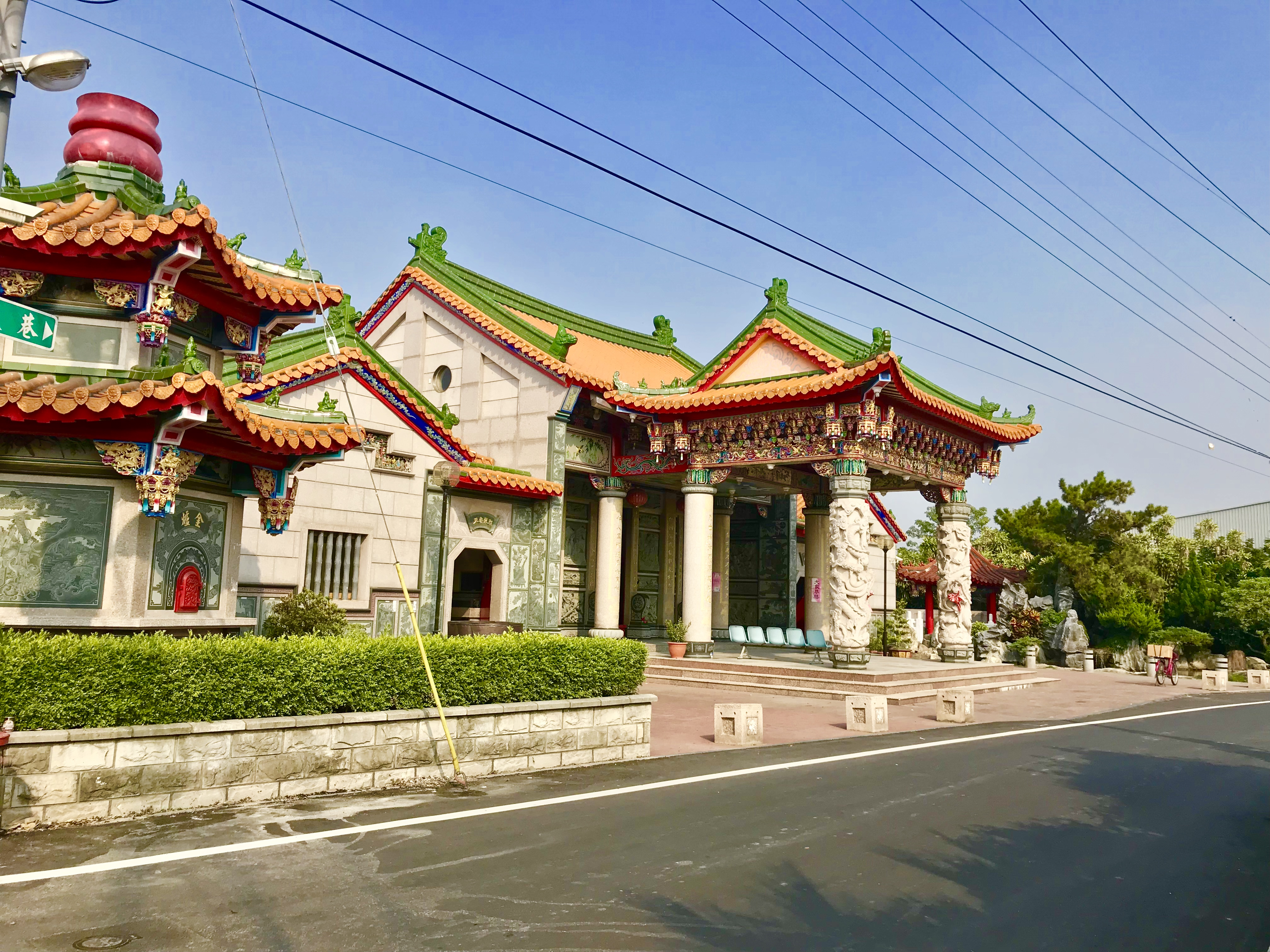 中文（台灣）: 恩烈祠斜照